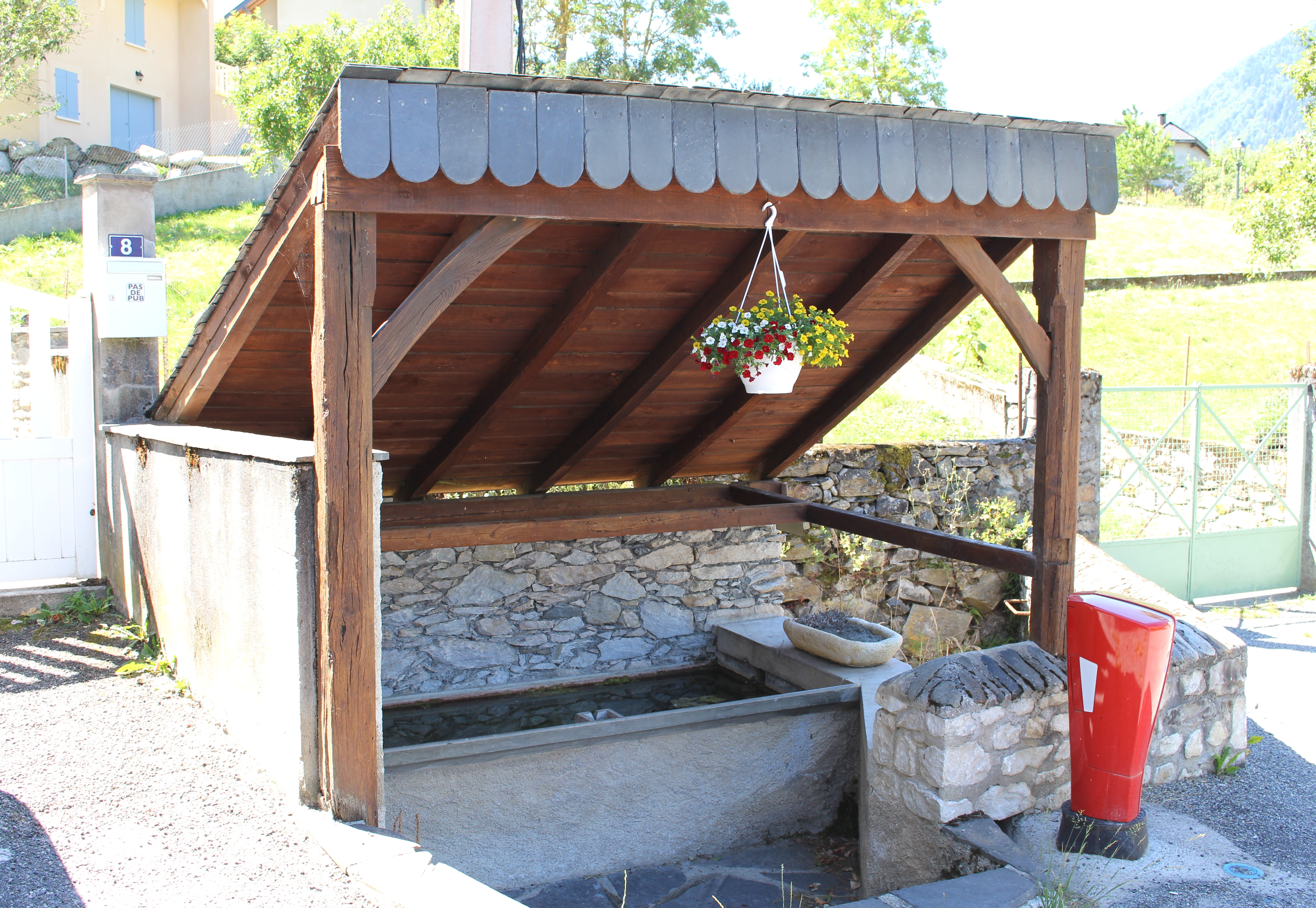 Lavoir de Grézian (Hautes-Pyrénées)